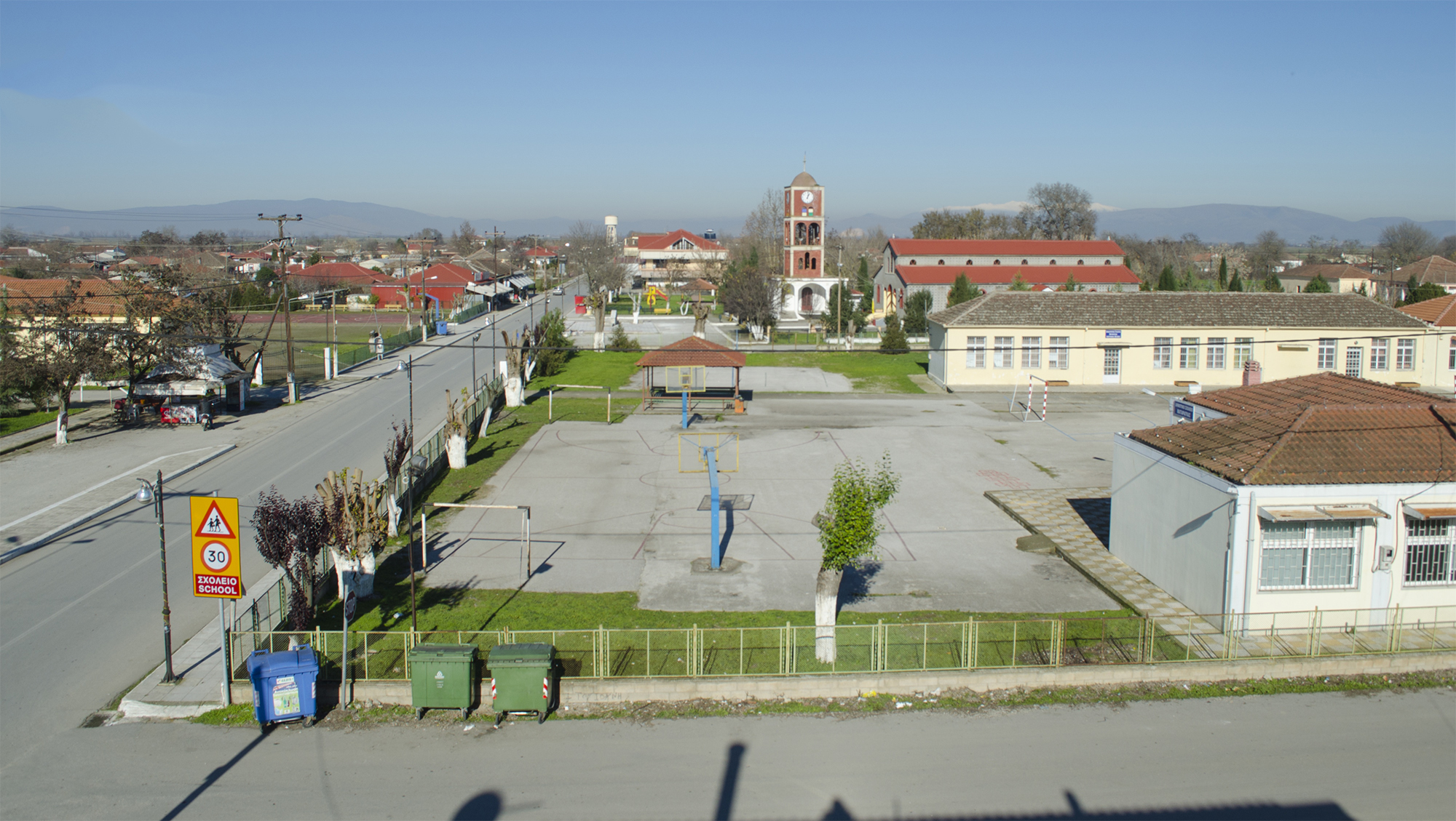 Ματαράγκα Καρδίτσας